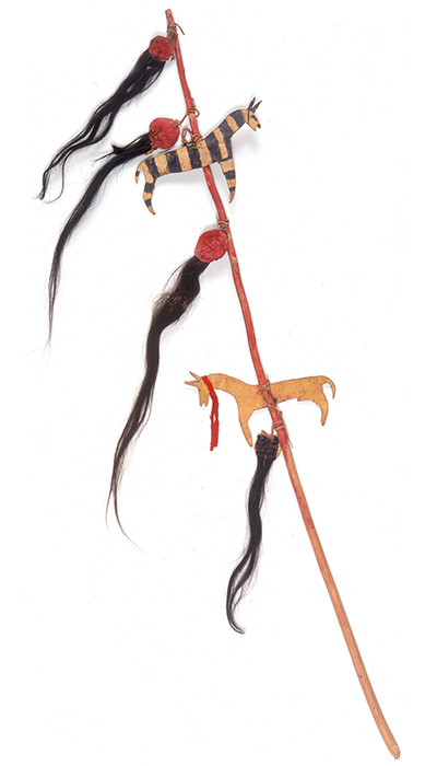 Жезл или палочка для совершения ку. Племя черноногих. Приблизительно 1800 год.